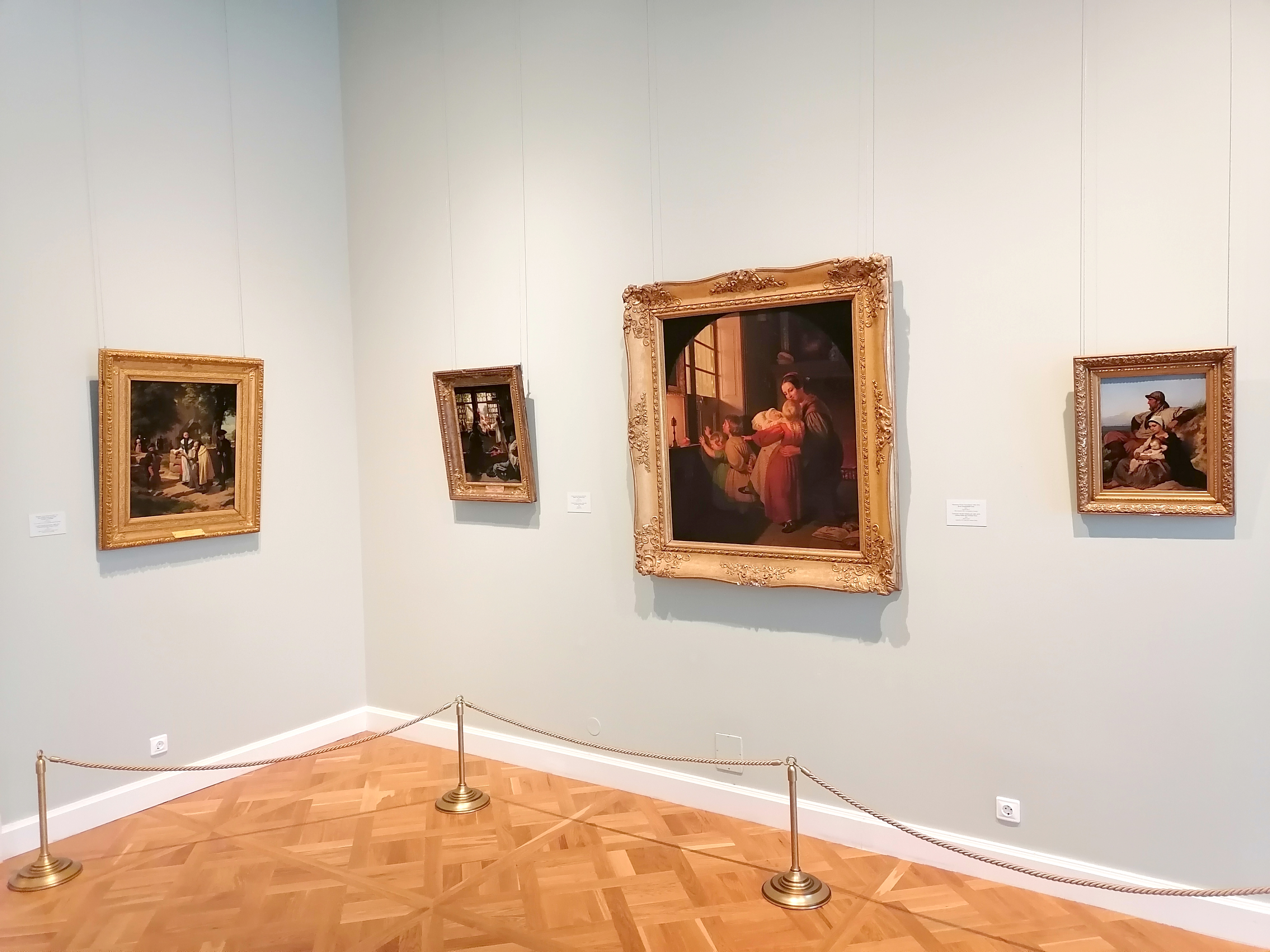 Здание Главного штаба - зал 340 - Ф. Мейерхем "Брайншвейгские крестьяне, идущие в церковь", он же "Сцена у окна", Т. Ф. Хильдебрандт "Дети в ожидании ёлки", Л. Галле "Семья рыбака"